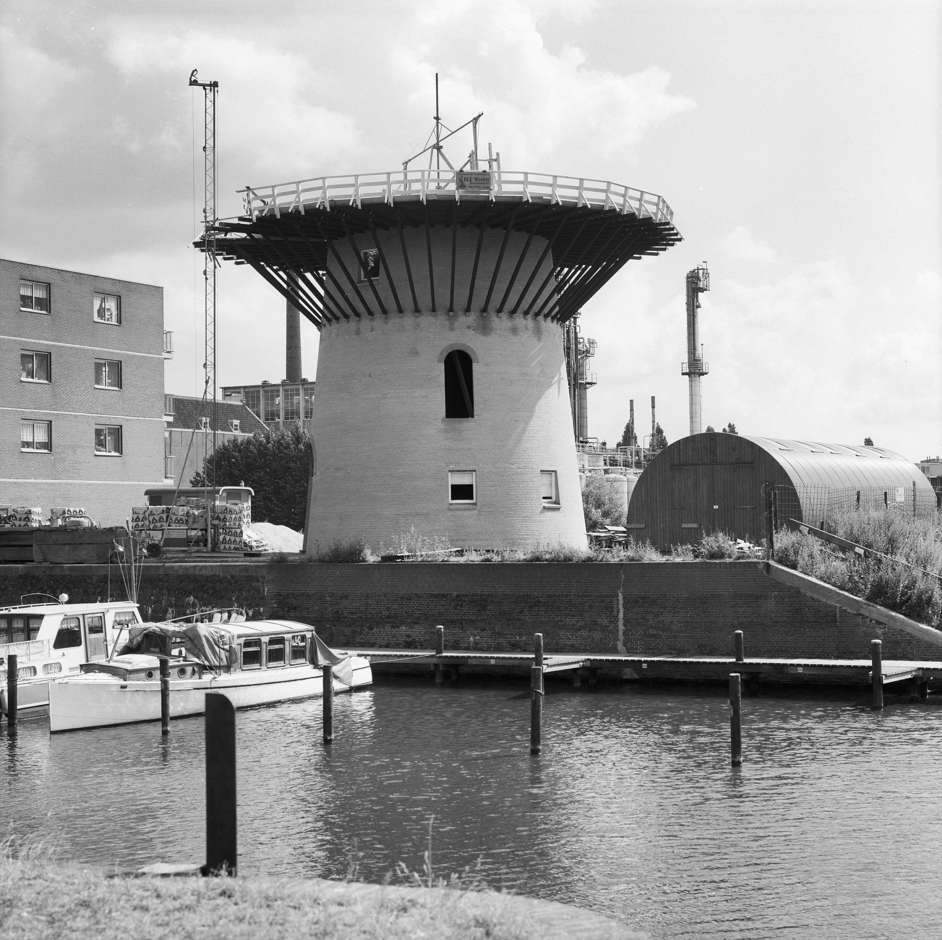 MOLEN DE DISTILLEERKETEL: Exterieur TIJDENS RESTAURATIE